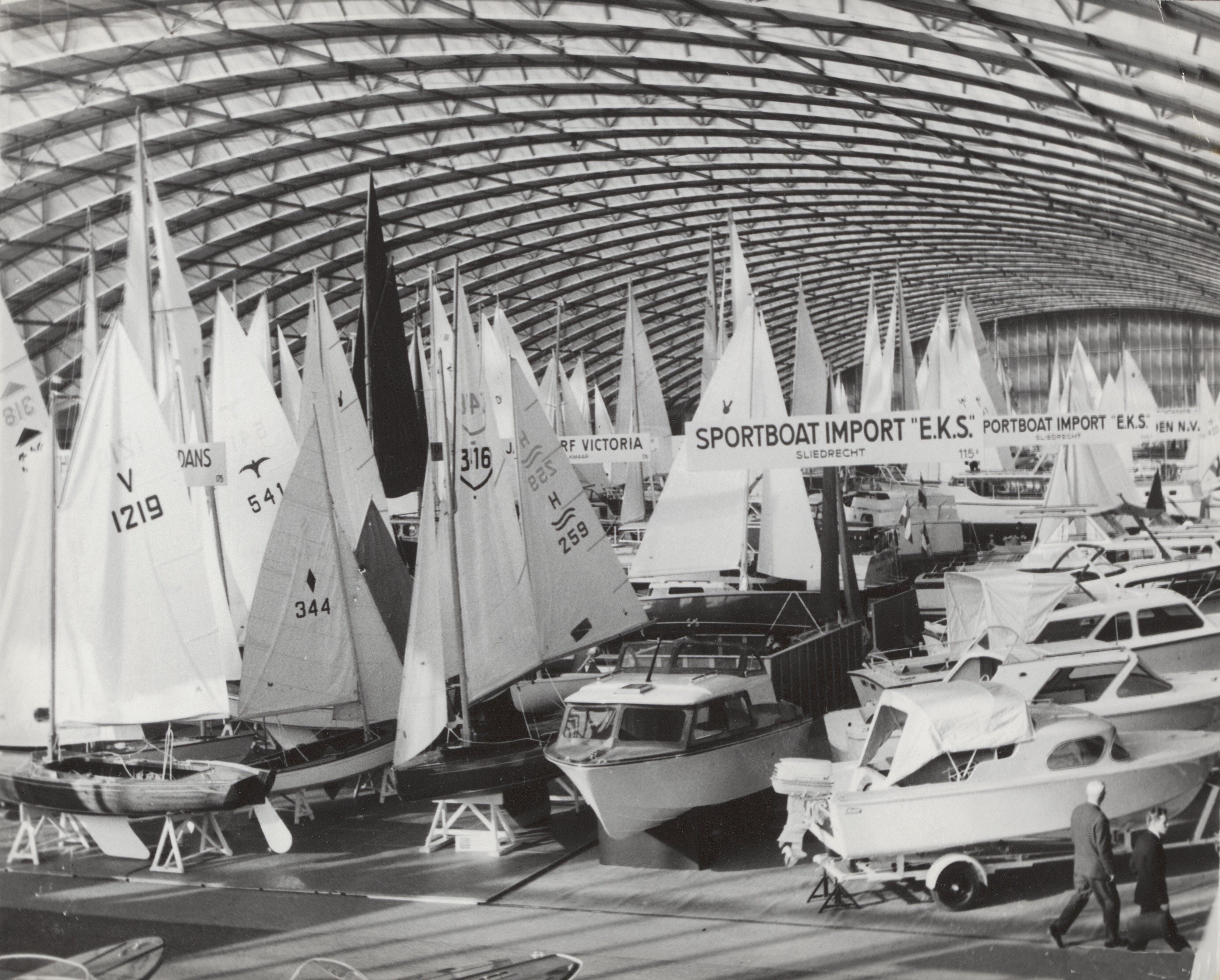 Collectie / Archief : Fotocollectie Elsevier Reportage / Serie : [ onbekend ] Beschrijving : 10e HIswa-tentoonstelling in de RAI te Amsterdam Datum : 12 maart 1965 Locatie : Amsterdam Trefwoorden : tentoonstellingen, watersporten Fotograaf : Evers, Joost / Anefo Auteursrechthebbende : Nationaal Archief Materiaalsoort : Foto (zwart/wit) Nummer archiefinventaris : bekijk toegang 2.24.05.02 Bestanddeelnummer : 054-0646